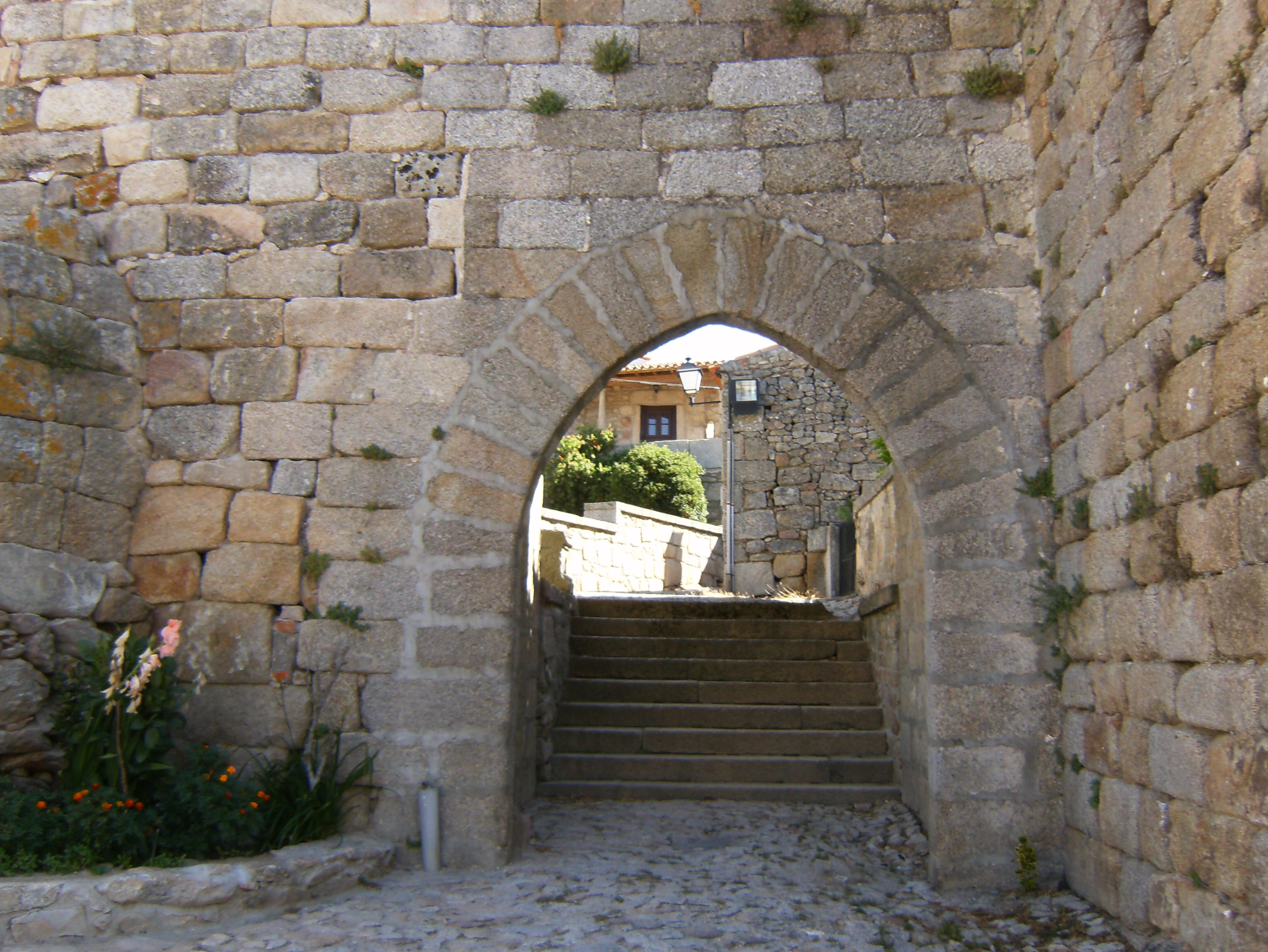 Porta da Vila (Século XIV), entrada principal do Castelo de Castelo Bom. Freguesia de Castelo Bom, concelho de Almeida, distrito da Guarda (Portugal)